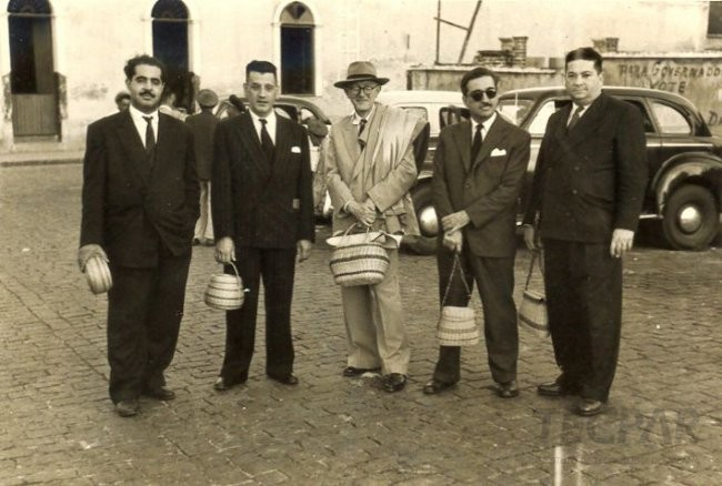 Metry Bacila e cientistas em Campinas.